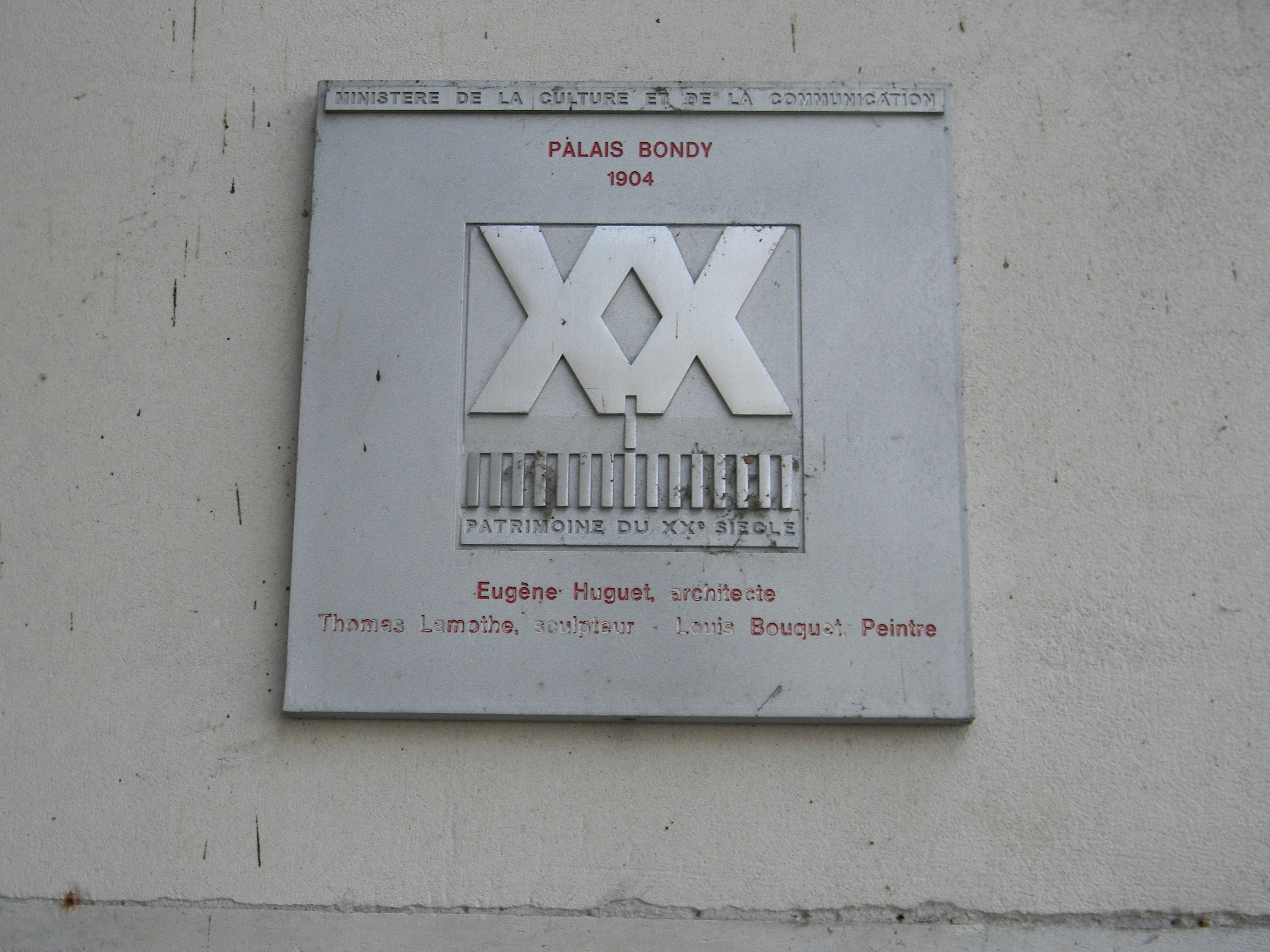 Ministère de la culture et de la communication Palais Bondy - 1904 Patrimoine du XXe siècle Eugène Huguet, architecte Thomas Lamothe, scuplteur - Louis Bouquet, peintre